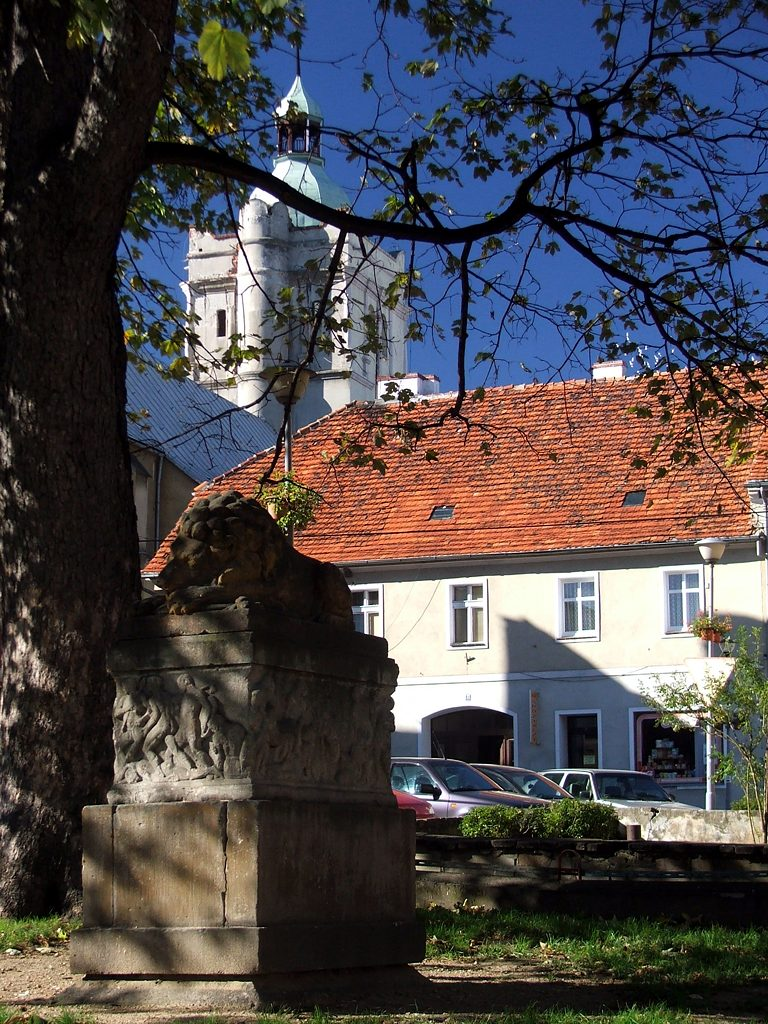 Złoty Stok (woj. dolnośląskie) – rzeźba lwa na rynku